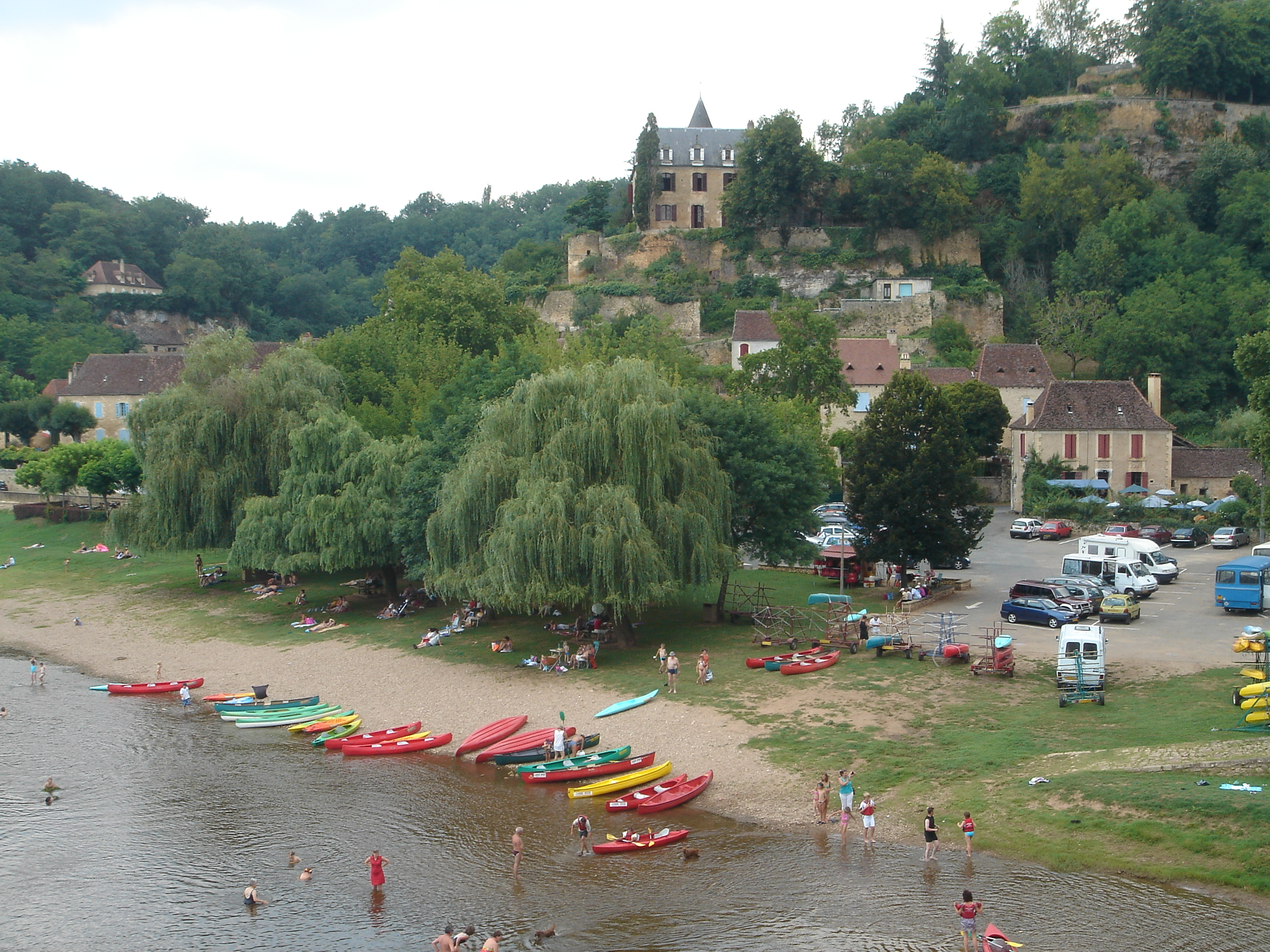 Kanus auf der Dordogne in Limeuil (24), Frankreich. Selbst fotografiert von Benutzer:Bordeaux, Juli 2006.